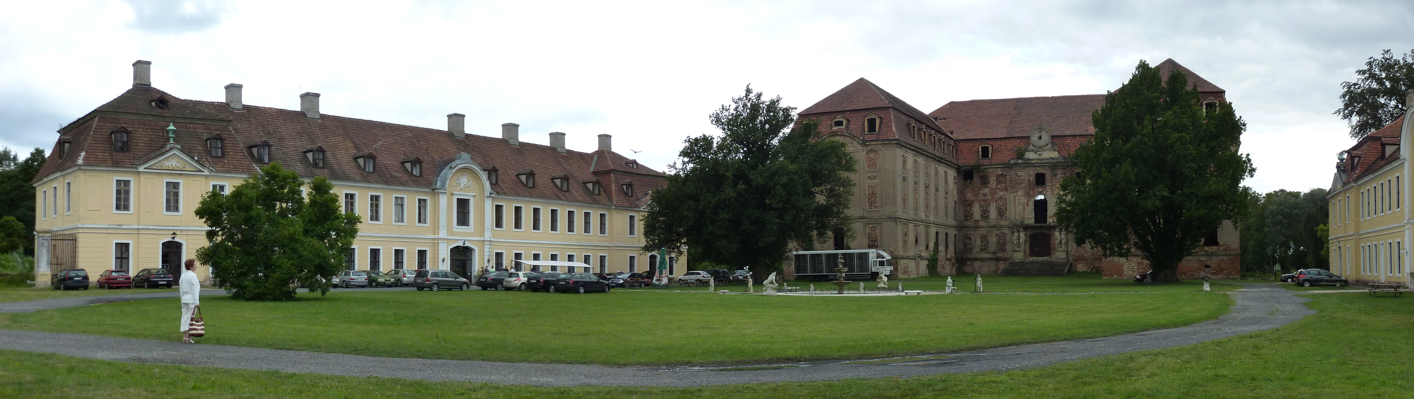 Pałac Brühlów wraz z oficynami